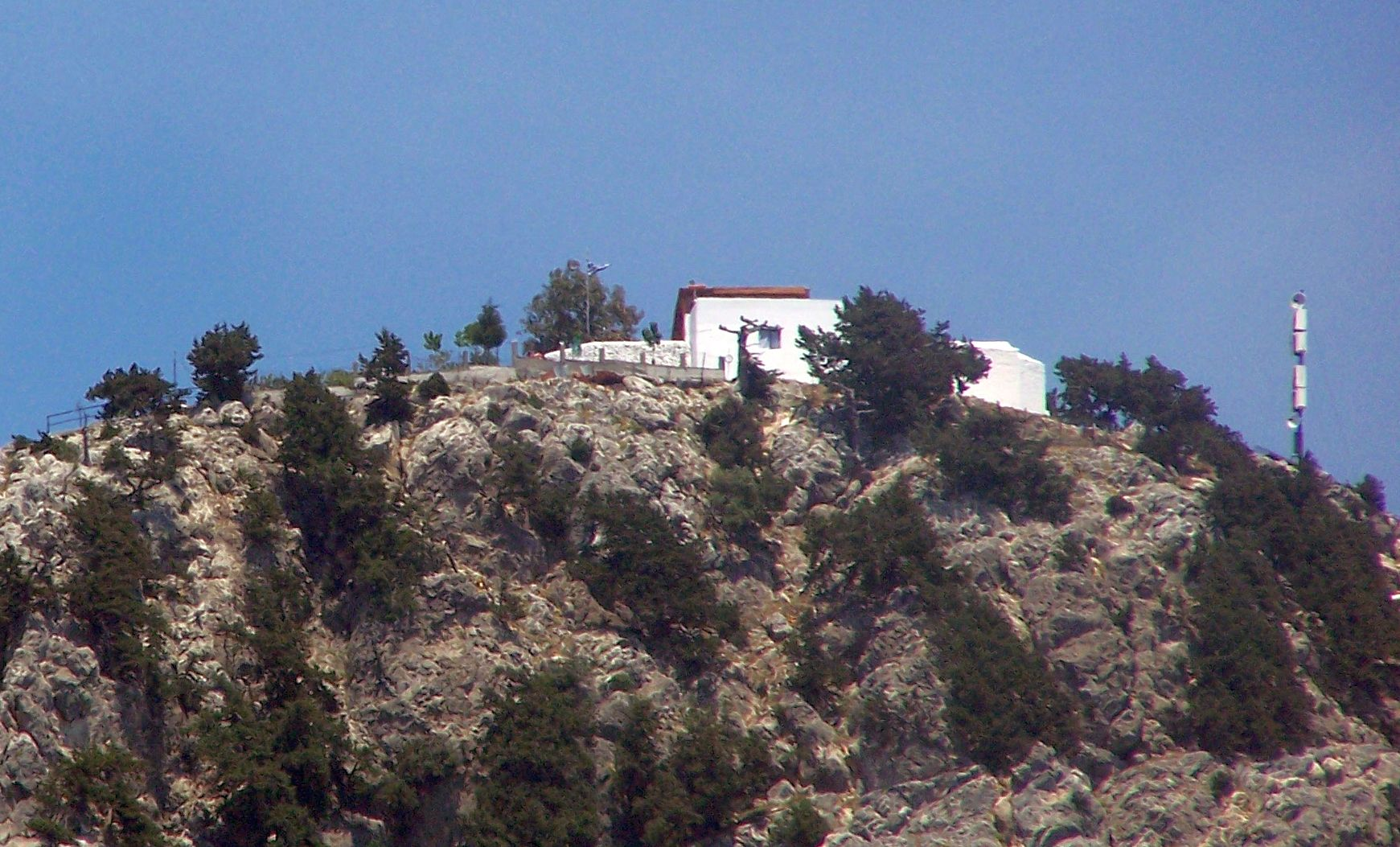 Die Kirche von Tsambika